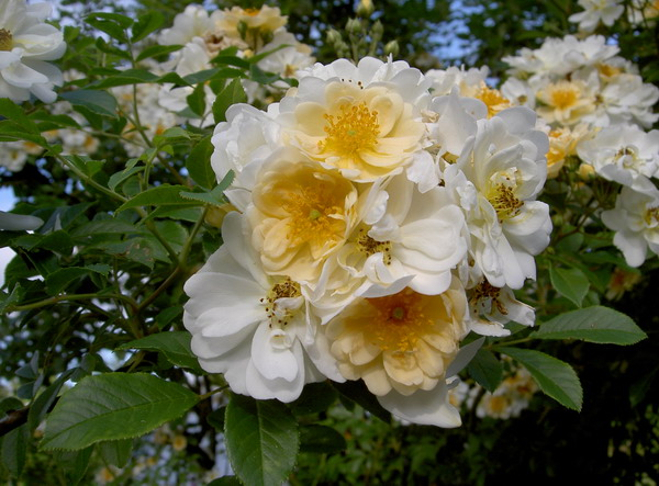 Rosa 'Hybrida'